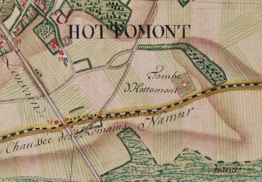 Extrait de la carte de Ferraris n° 114B